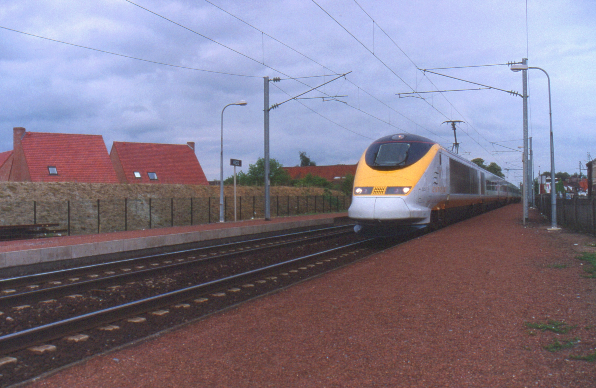 Eurostar en provenance de Bruxelles et à destination de Londres, passant par la gare d'Ascq en 1996.